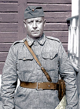 Majuri Heikki Saure